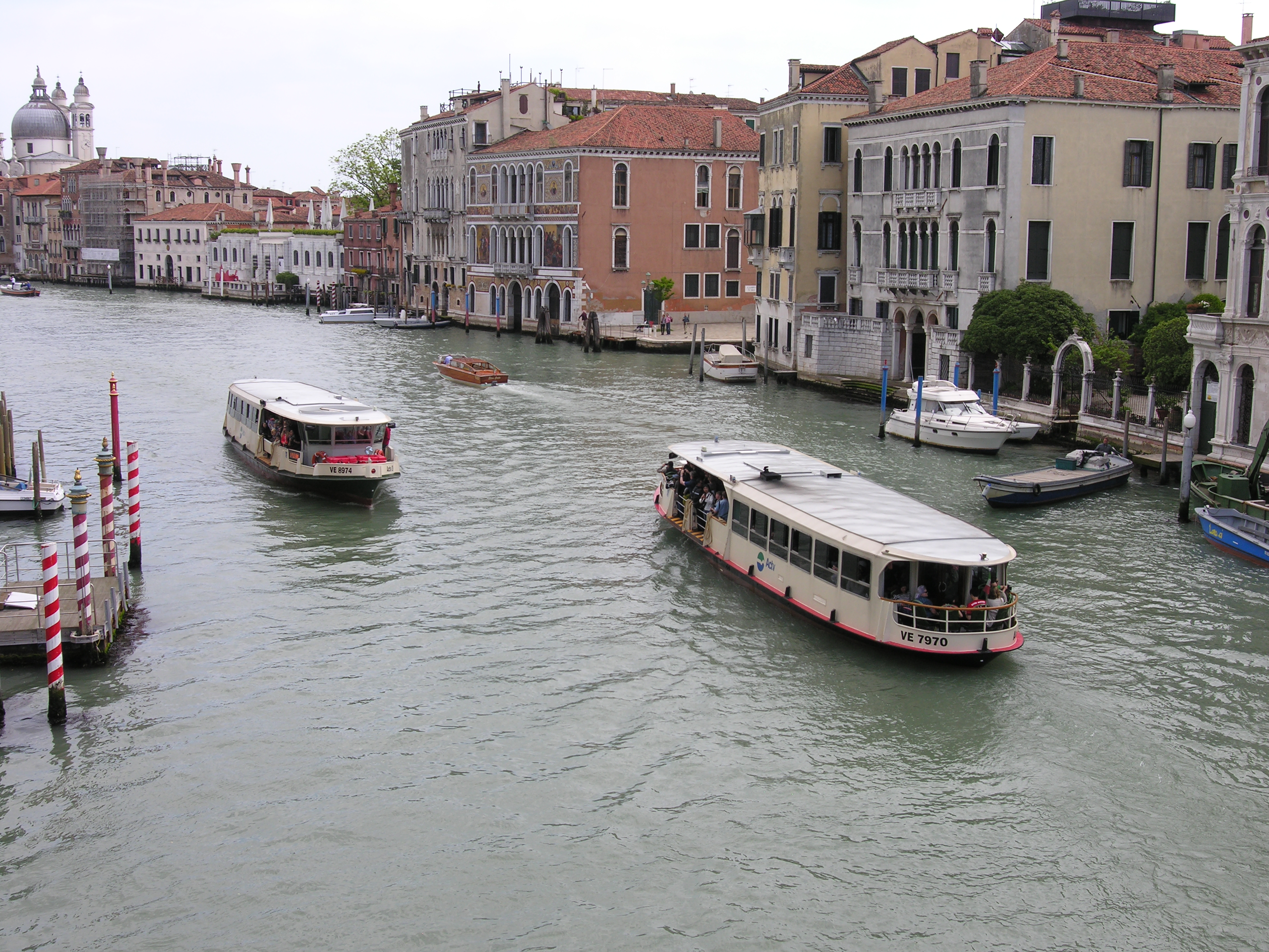 Venezia-Murano-Burano, Venezia, Italy